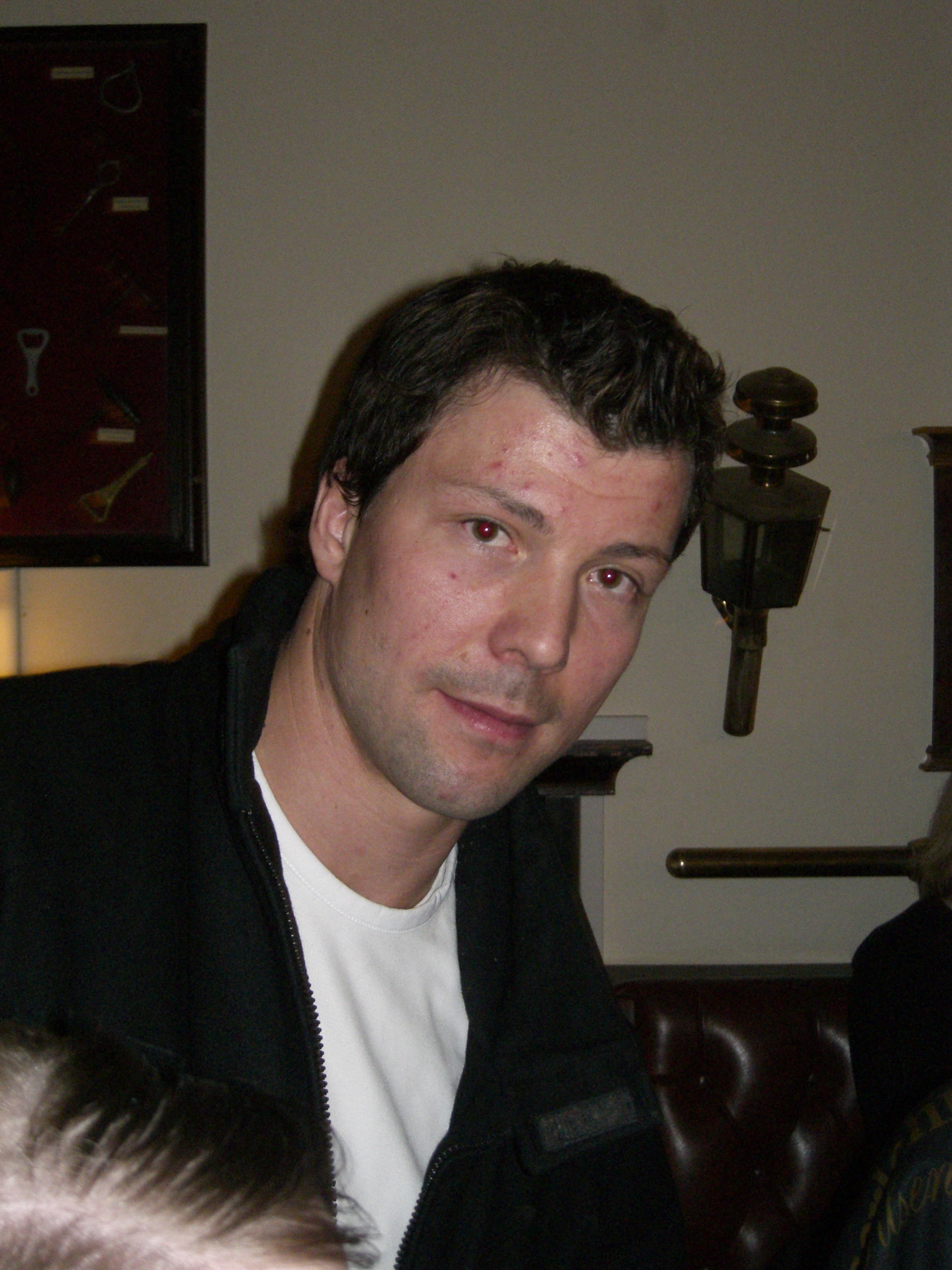 Erich "Rick" Goldmann, Eishockey-Spieler der Iserlohn Roosters selbst fotografiert